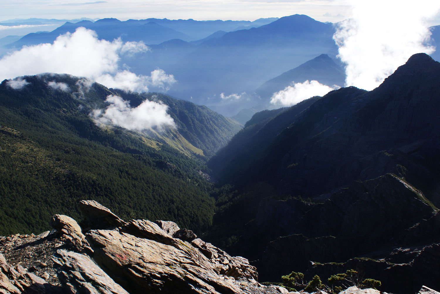 荖濃溪源峽谷，位於玉山主峰東北側 The source of Laonung rive(Taiwan) at the northeastern side of YuShan, Jade mountain.